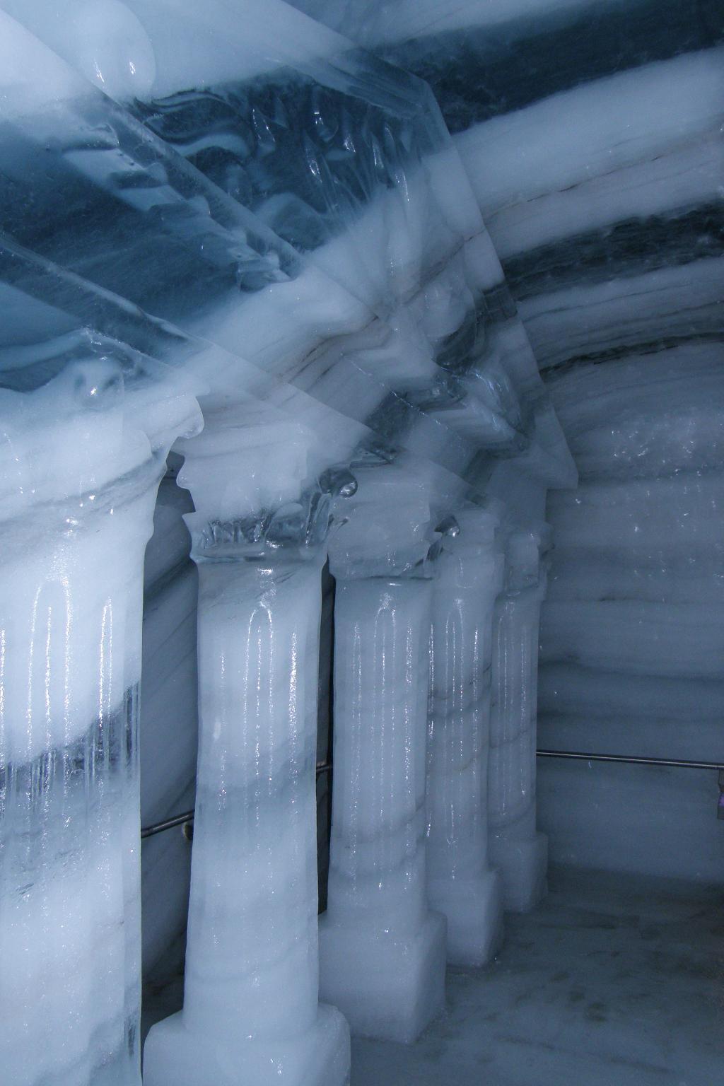 Dachstein Eispalast, pałac lodowy